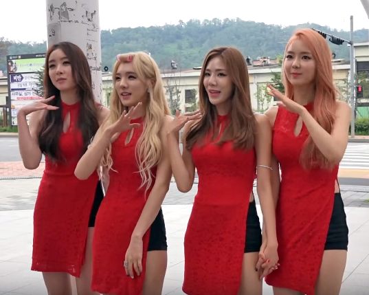 2015년 7월 22일의 스텔라